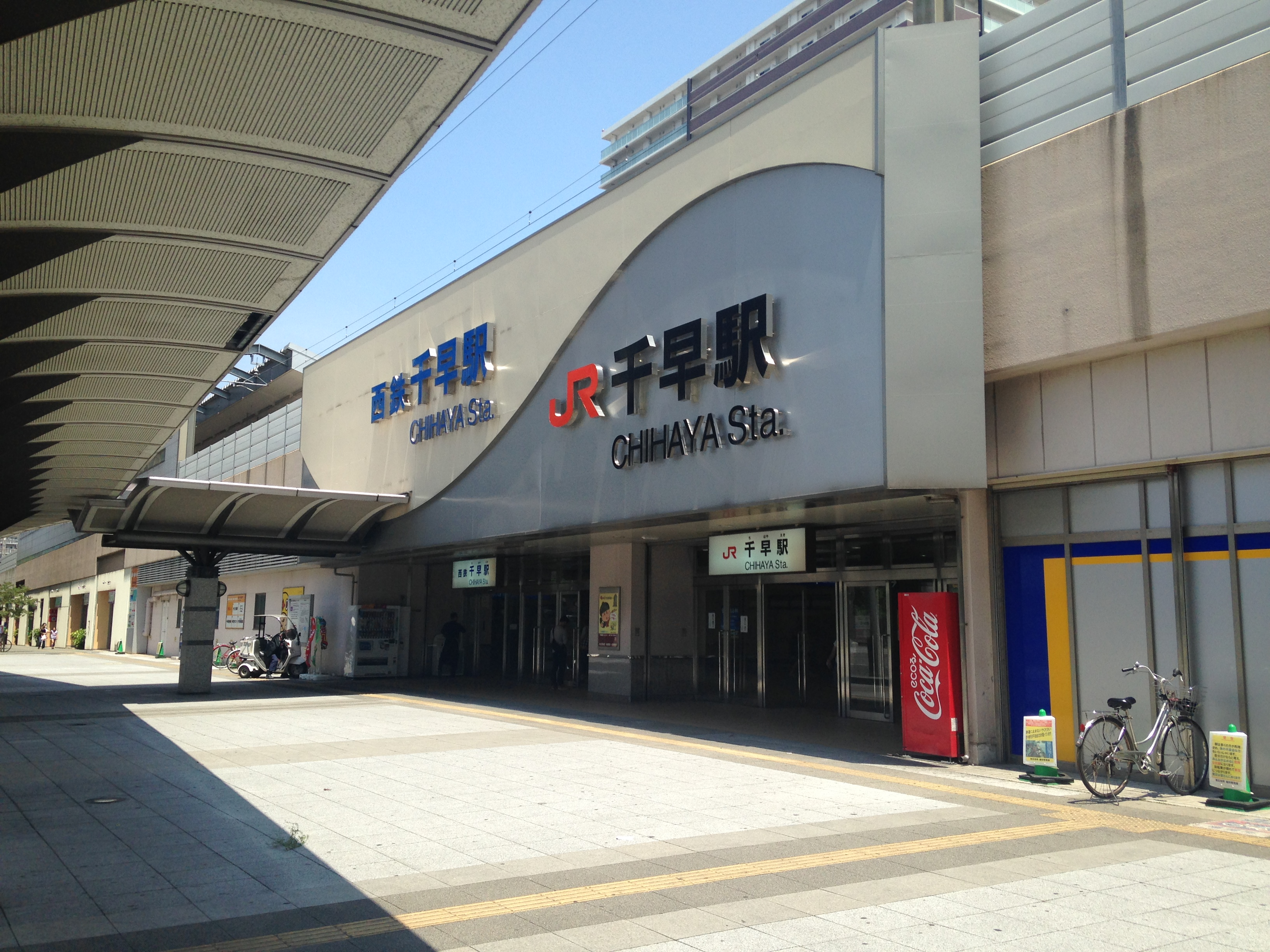 千早駅西口